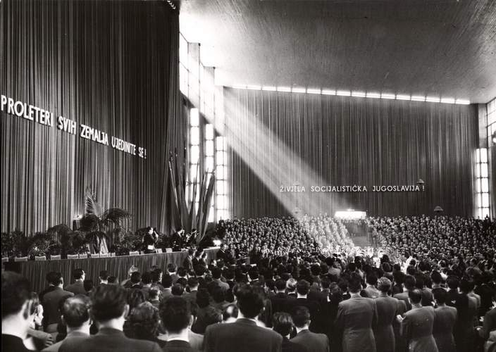 Srpski (latinica): Šesti kongres KPJ u Zagrebu 1952. godine